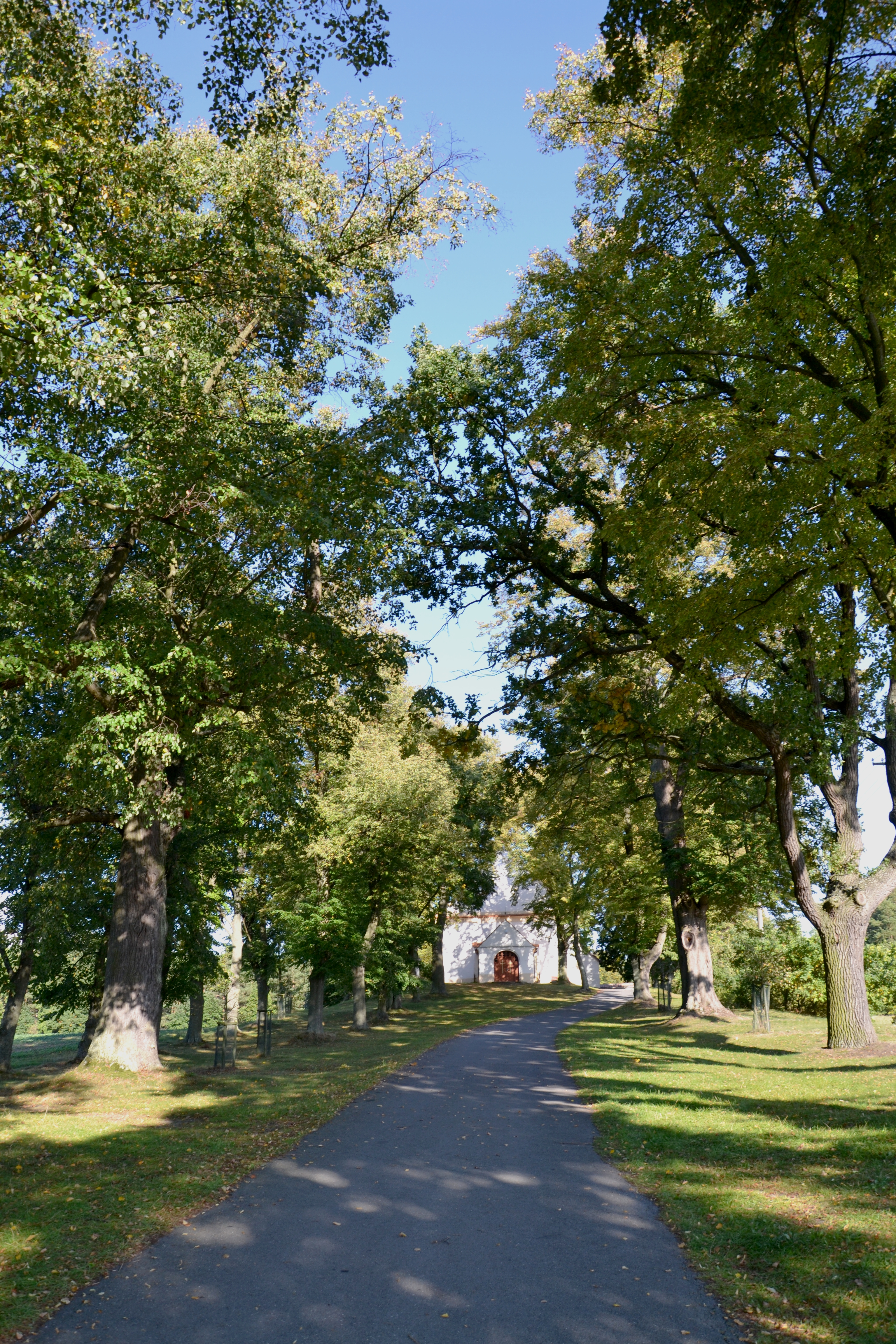 POUTNÍ KOSTEL SV. JANA KŘTITELE A PANNY MARIE (KVĚTOV)